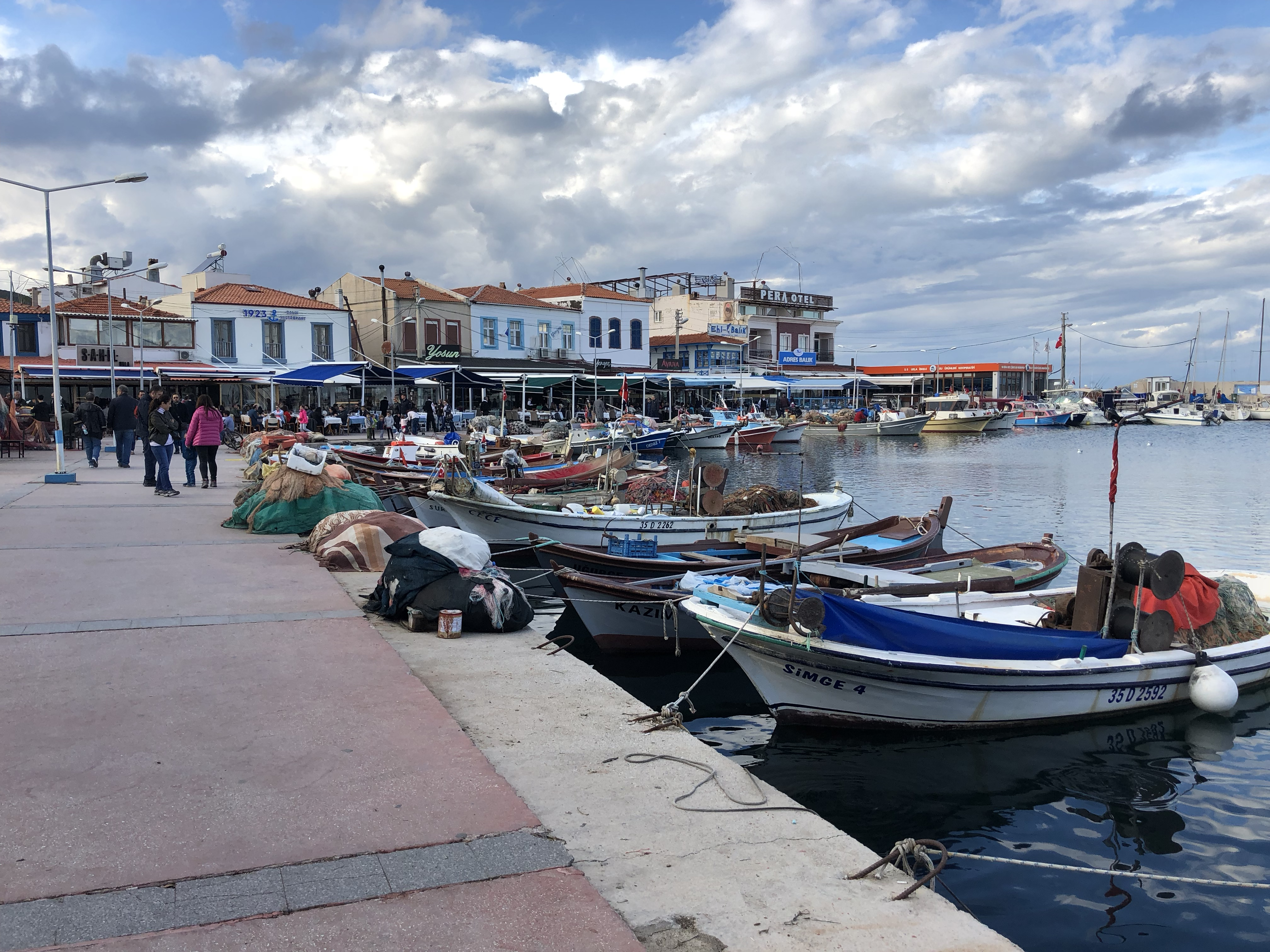 İzmir Urla İskele